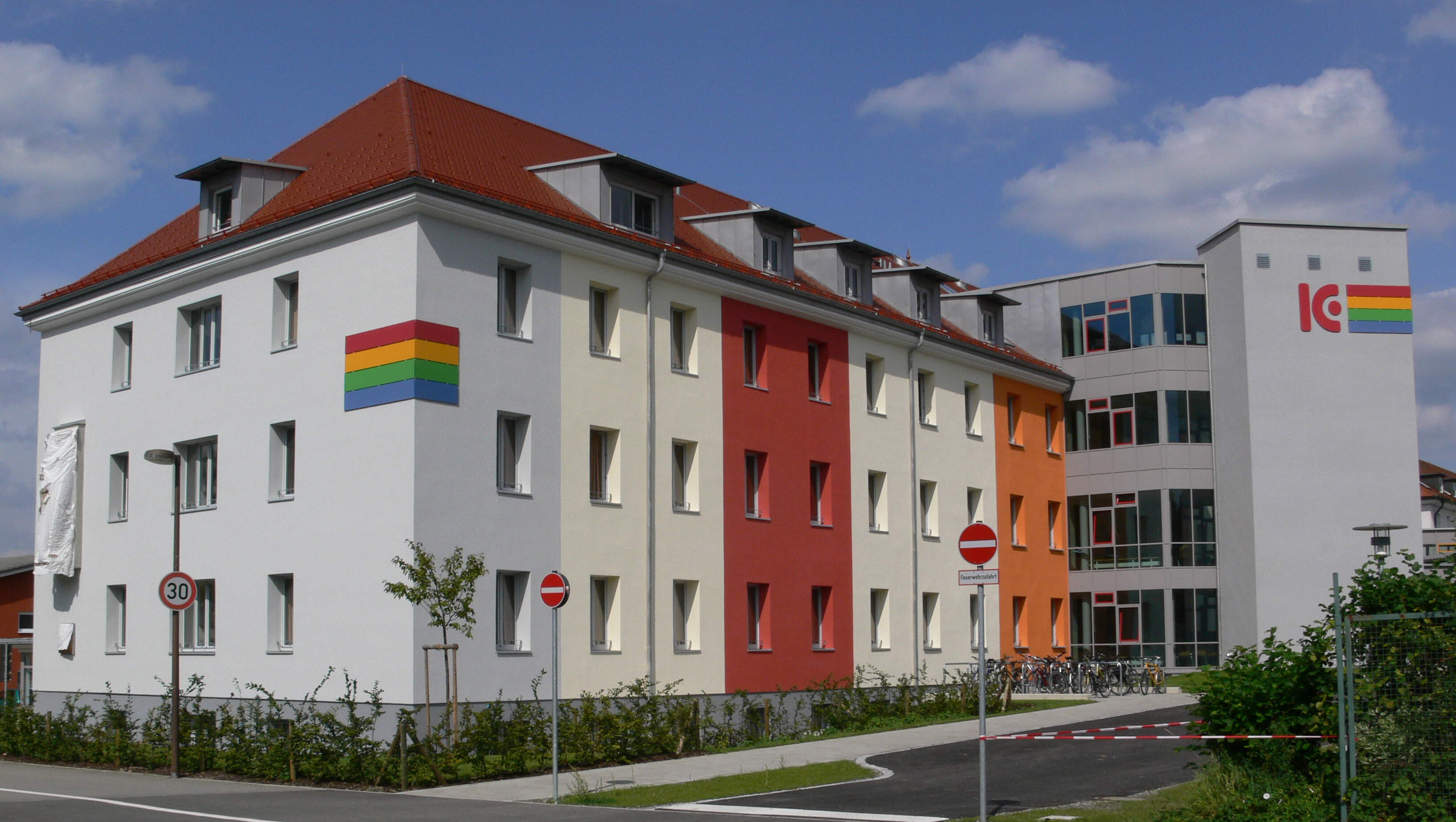 Weingarten (Württemberg), Körperbehinderten-Zentrum Oberschwaben (KBZO), Schule (seit 2011 Geschwister-Scholl-Schule)